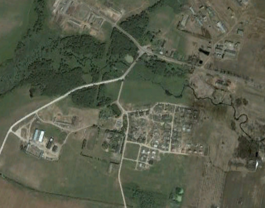 Фото со спутника поселка Поплавцы